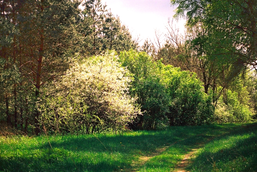 Kampinoski Park Narodowy - wiosna